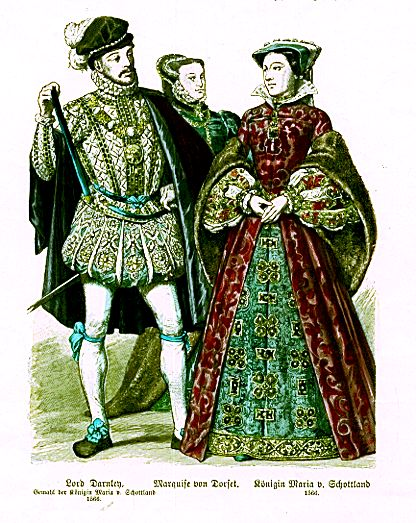 Мария Стюарт и лорд Дарнли